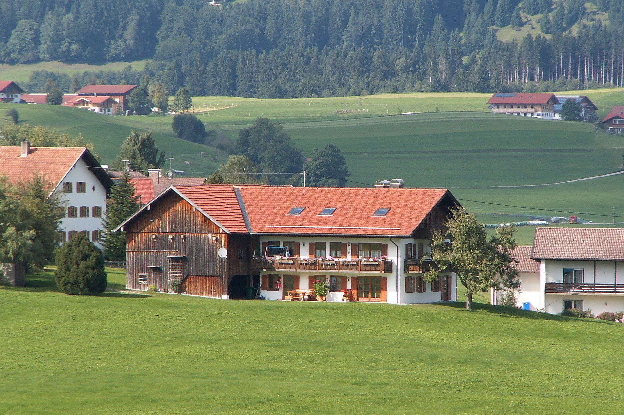 Schraden 91, Hopferau